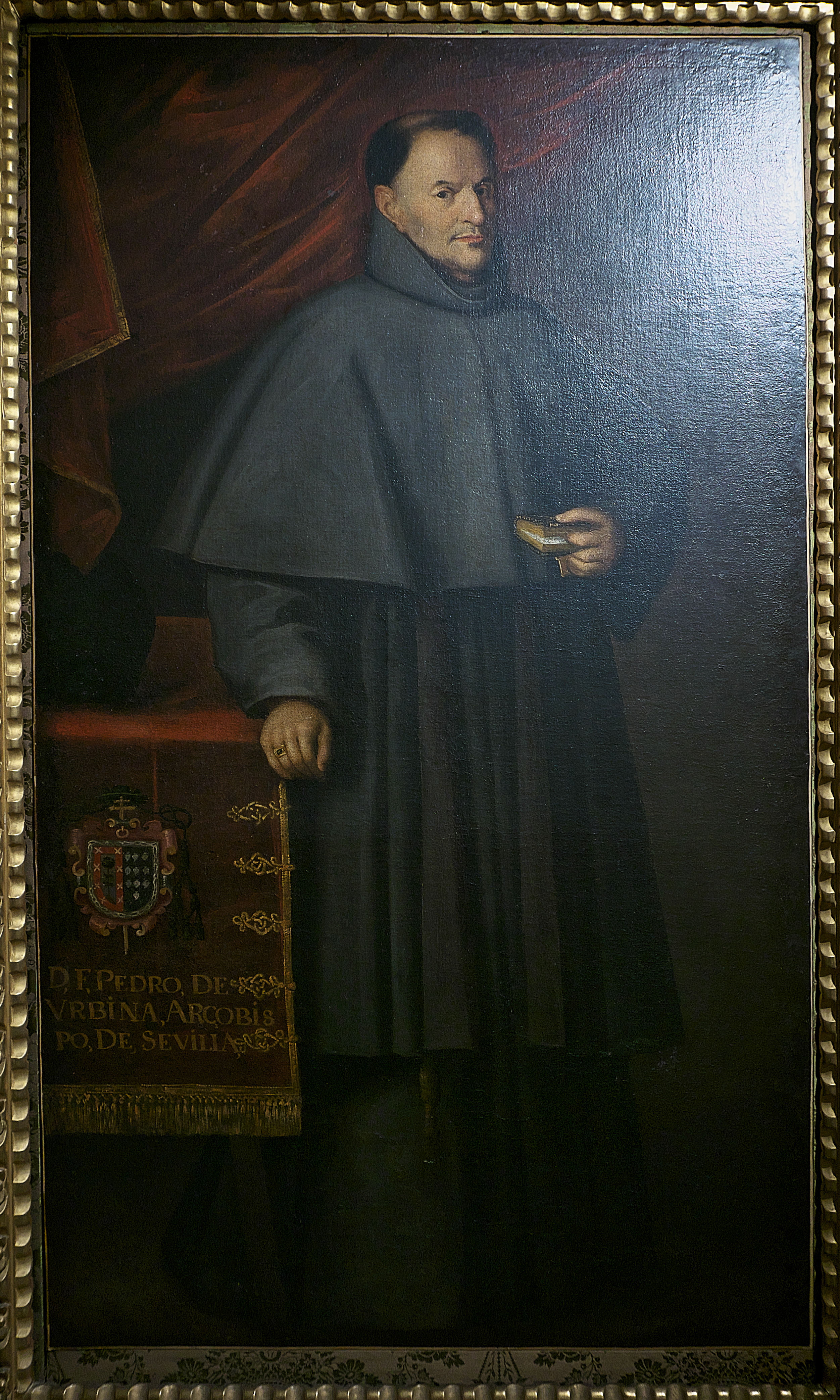 Retrato de Fray Pedro de Urbina (†1663), óleo sobre lienzo atribuido a Bartolomé Esteban Murillo (ca. 1644-1648). Probablemente, procedente de la Casa Grande de San Francisco.